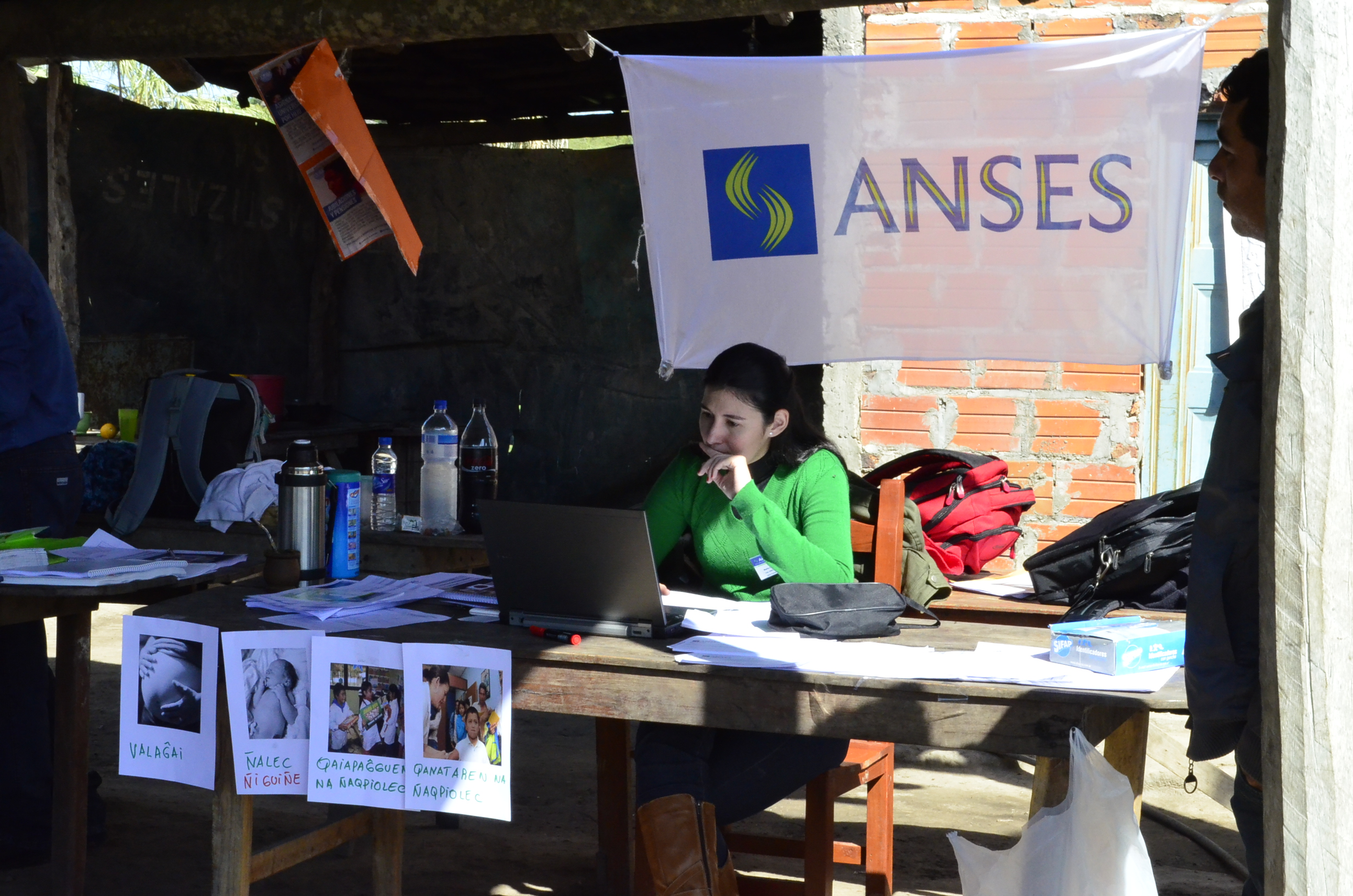 Las acciones que lleva adelante ANSES orientadas a los pueblos originarios aseguran la presencia de la seguridad social, con criterios de pluralidad, inclusión y participación de las comunidades donde el organismo acciona. Actualmente, el organismo previsional desarrolla diferentes programas que abordan la cuestión indígena de una manera integral: capacitación presencial, campaña informativa en lenguas originarias y entrega de netbooks en escuelas de Educación Intercultural Bilingüe. Desde 2009, implementa el programa Bienestar para nuestra gente de capacitación en Seguridad Social para los pueblos indígenas. El programa tiene como propósito garantizar el acceso de los pueblos indígenas a las prestaciones de la Seguridad Social, desde el respeto y valorización de su identidad cultural. La iniciativa contempla el mejoramiento de los canales institucionales para la tramitación de las prestaciones de ANSES y formación y capacitación sobre los derechos. Para complementar las jornadas de formación y ampliar el impacto, durante 2011 trabajó en una campaña informativa en diversas lenguas indígenas para realizar afiches y micros radiales sobre la Asignación Universal y por Embarazo, la posibilidad de obtener una jubilación y los derechos sociales que otorga ANSES. La campaña informativa en lenguas indígenas se realizó de manera participativa, por eso ANSES realizó jornadas junto a qom y wichis de Ing. Juarez en Formosa y con mbya guaraní de Aristóbulo del Valle, Misiones. Todas las comunidades recibieron con entusiasmo la propuesta y emprendieron el trabajo de realizar las traducciones en conjunto. En cada una de los encuentros se debatía acerca del significado para la comunidad de las prestaciones que brinda ANSES y los maestros bilingües fueron los encargados de las traducciones tanto para el guión del spot radial como para el texto de la pieza gráfica.